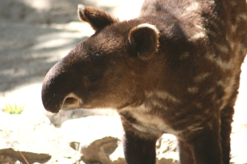 Tapirus pinchaque